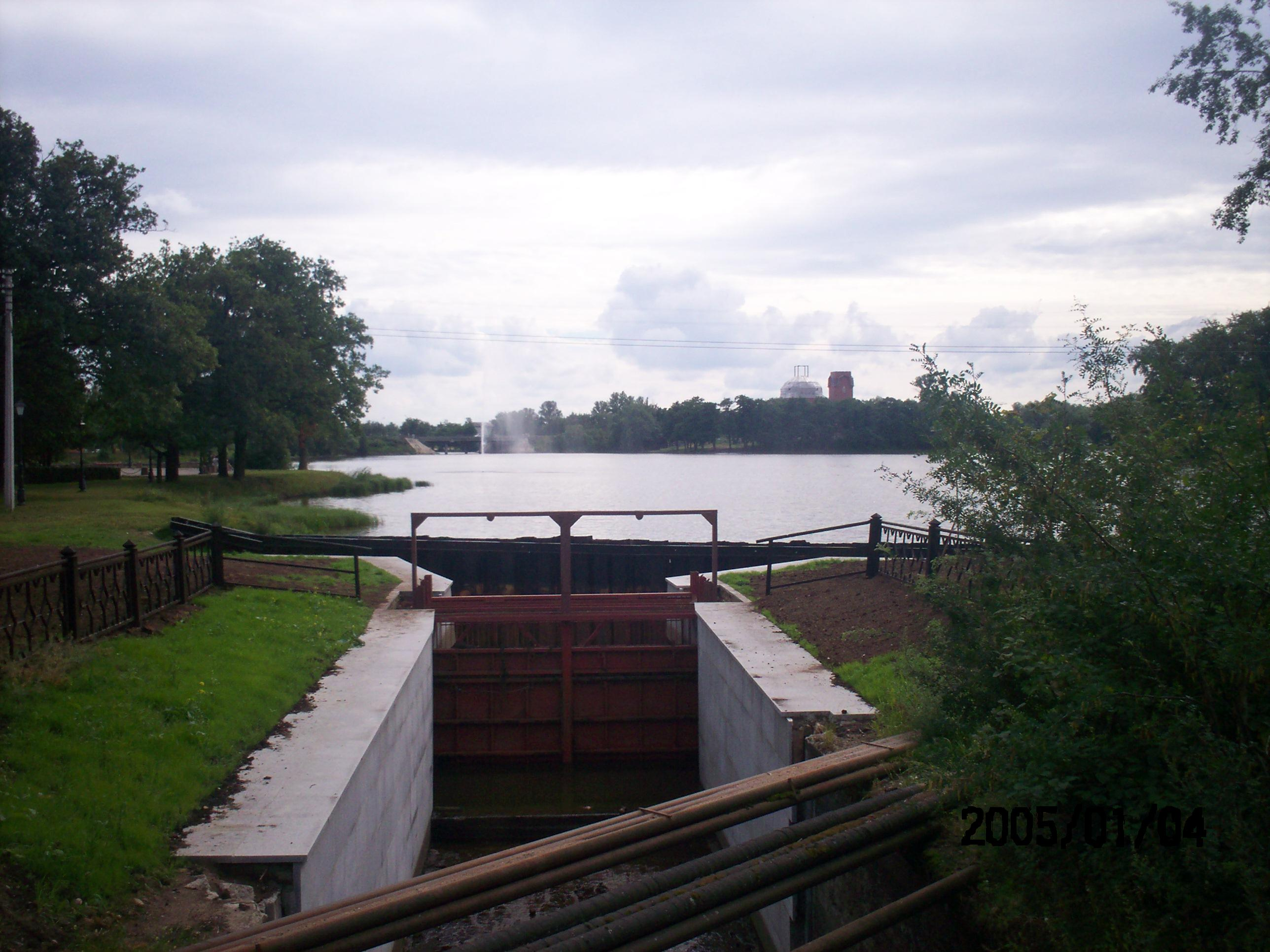 Озеро Сестрорецкий Разлив (г. Сестрорецк)